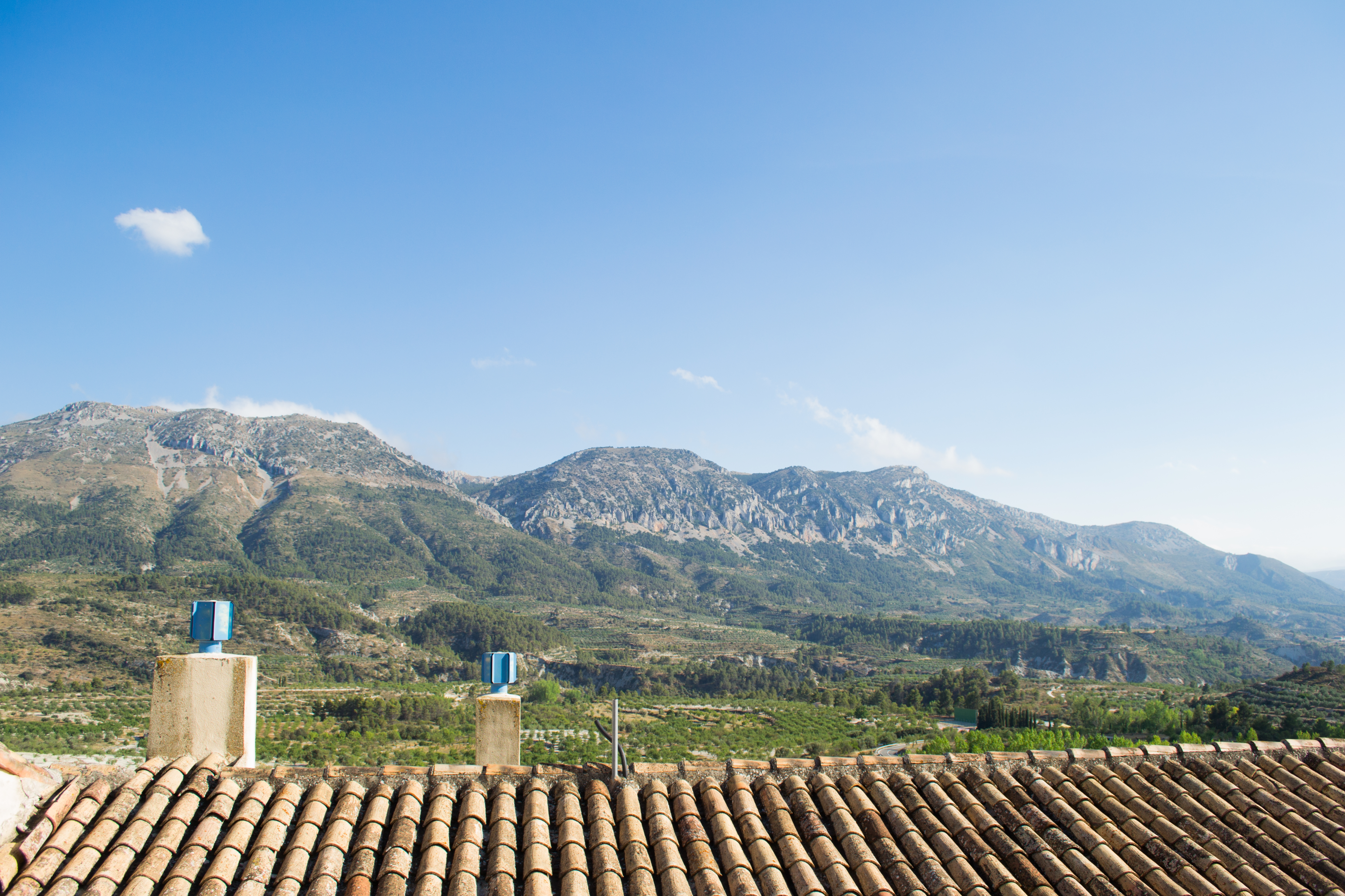 Serra de la Serrella des de Benimassot.